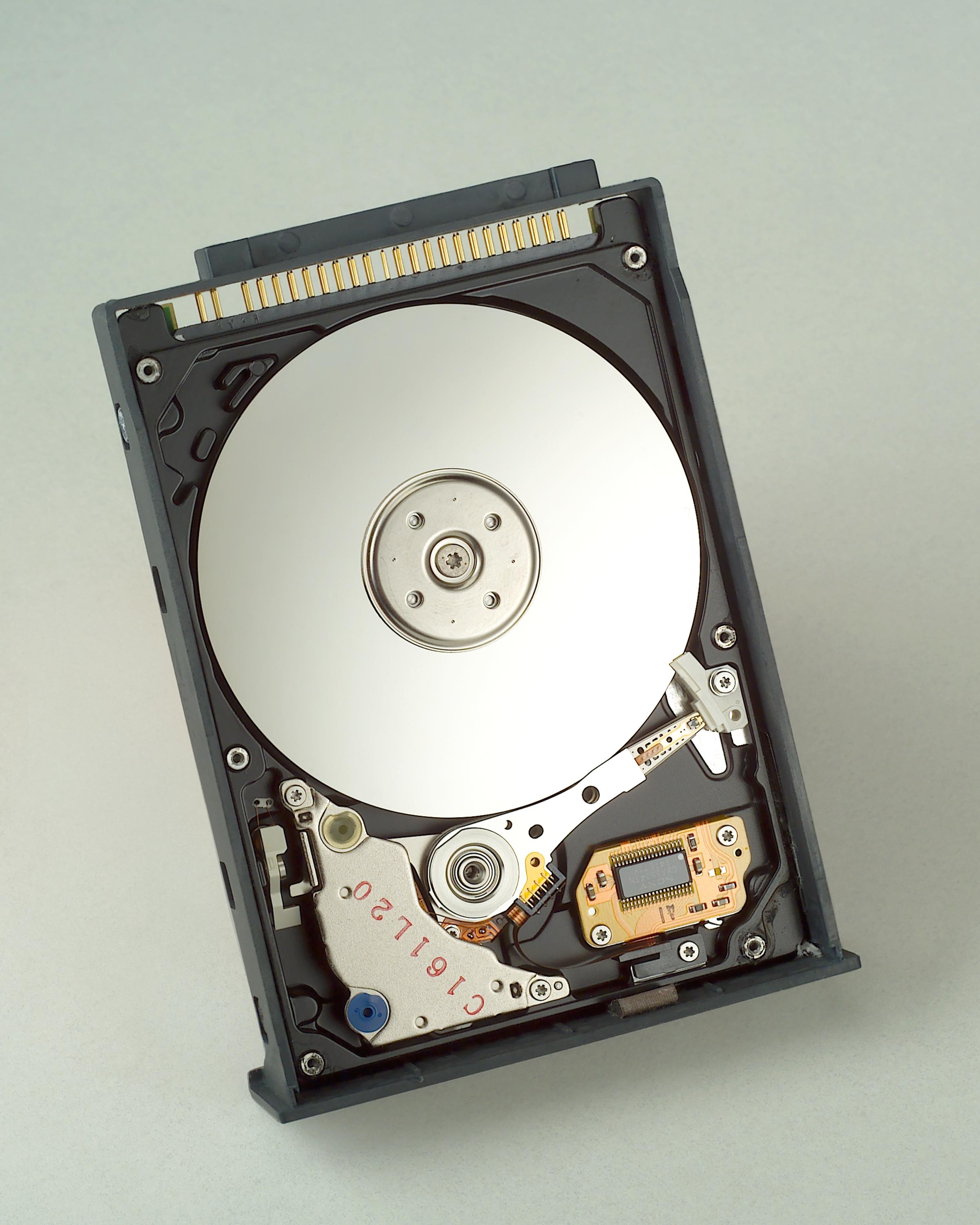 photos electroless nickel